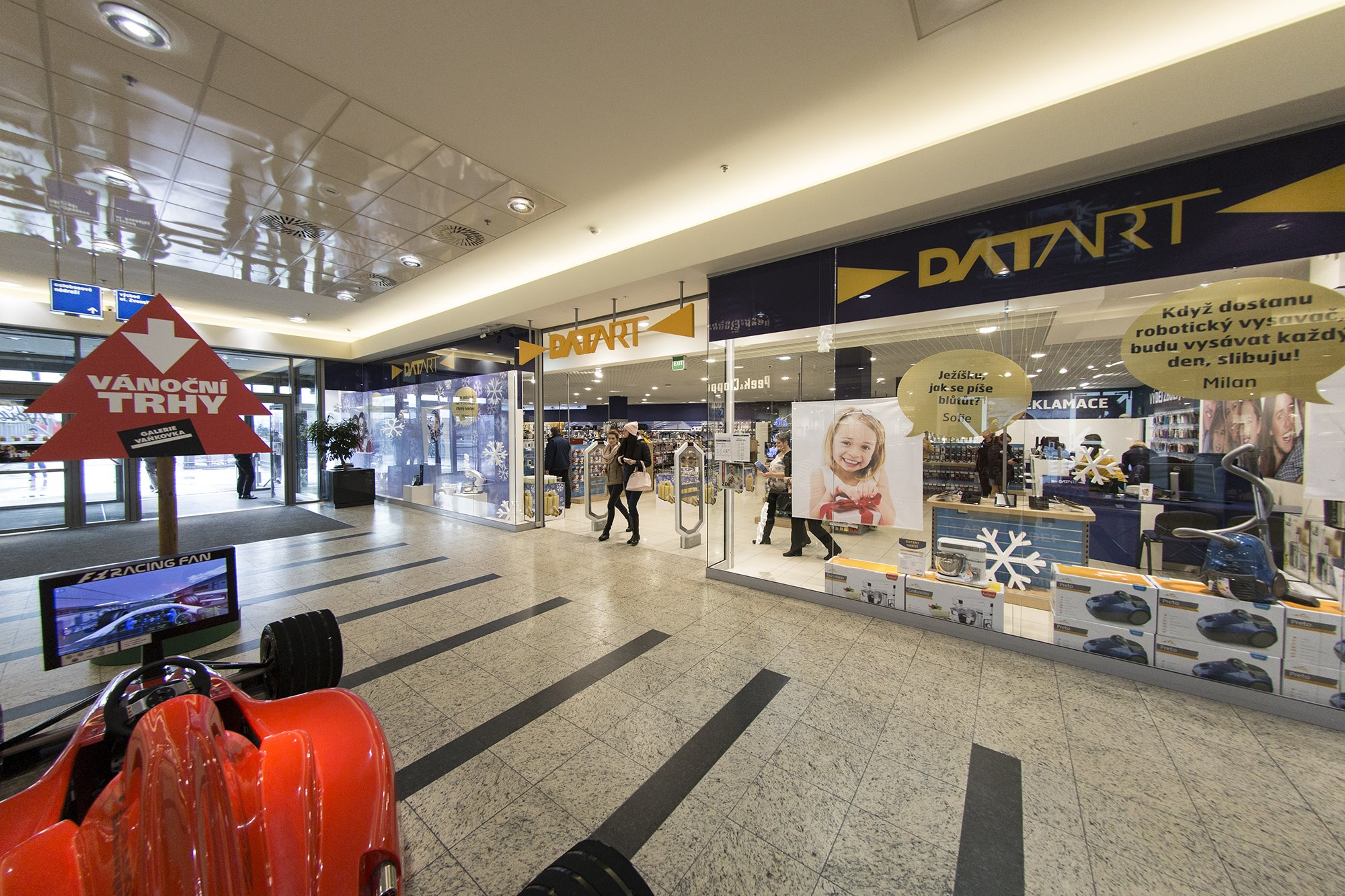 Datart, Vaňkovka, Brno